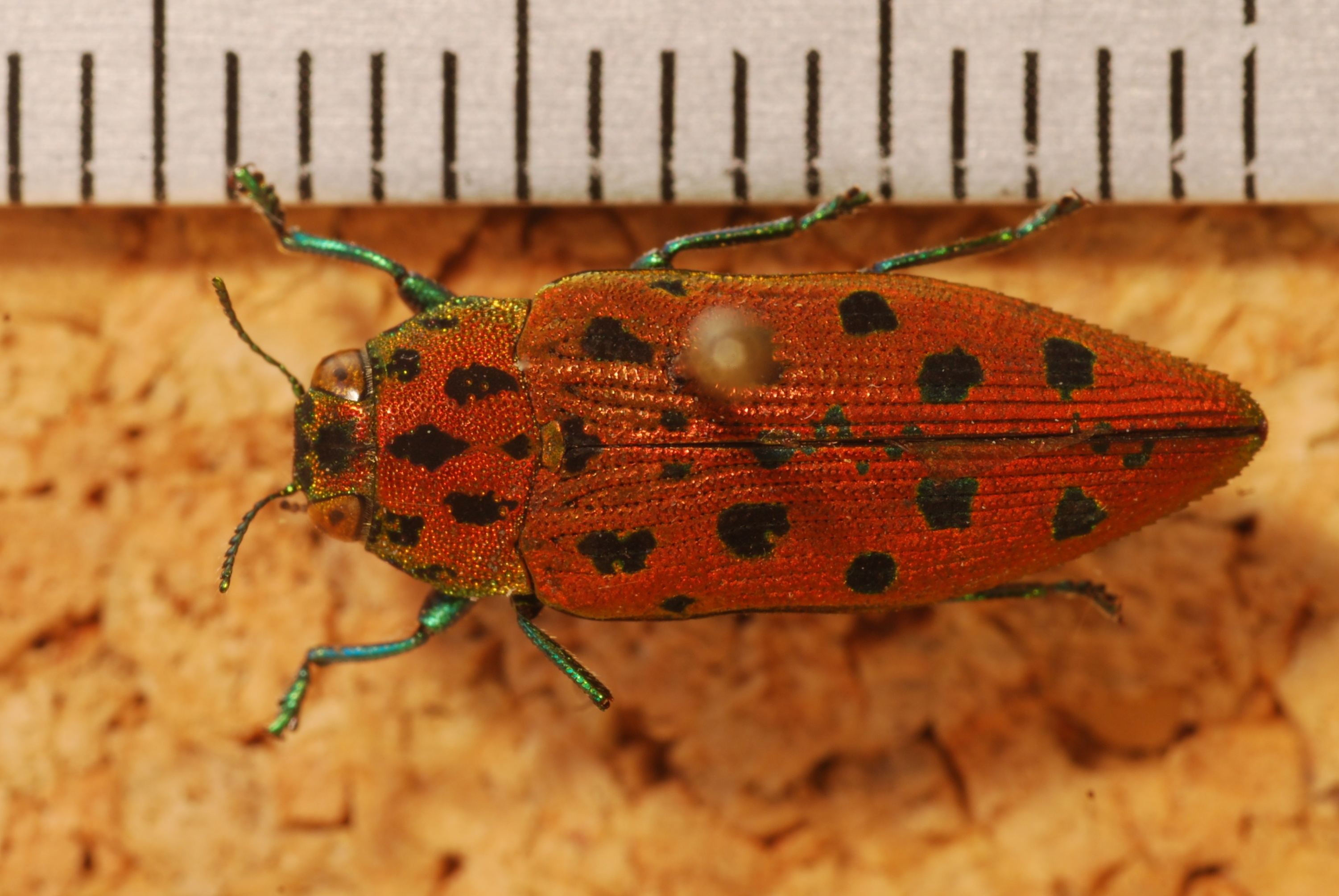 Ranau, Sabah, MALAYSIA